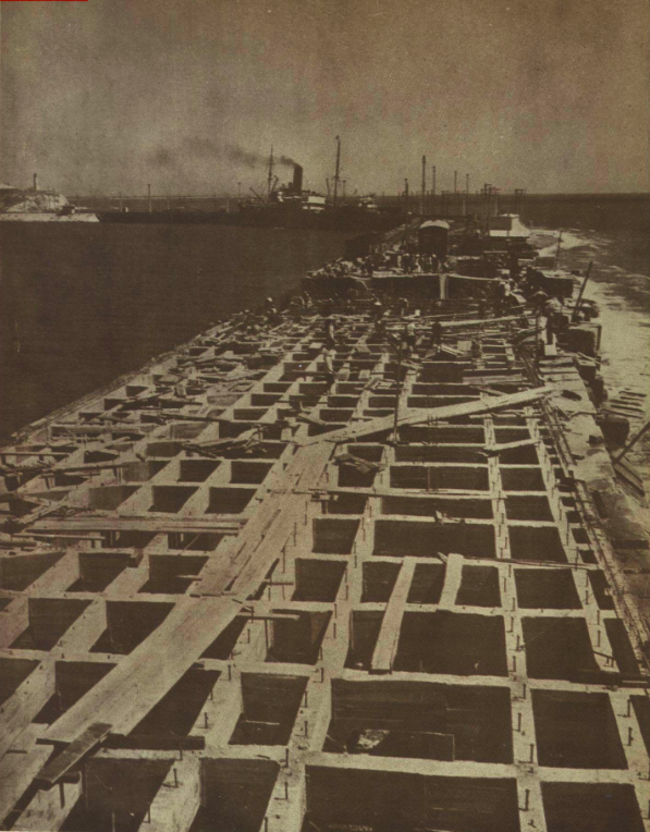 1952年秦皇岛七号码头